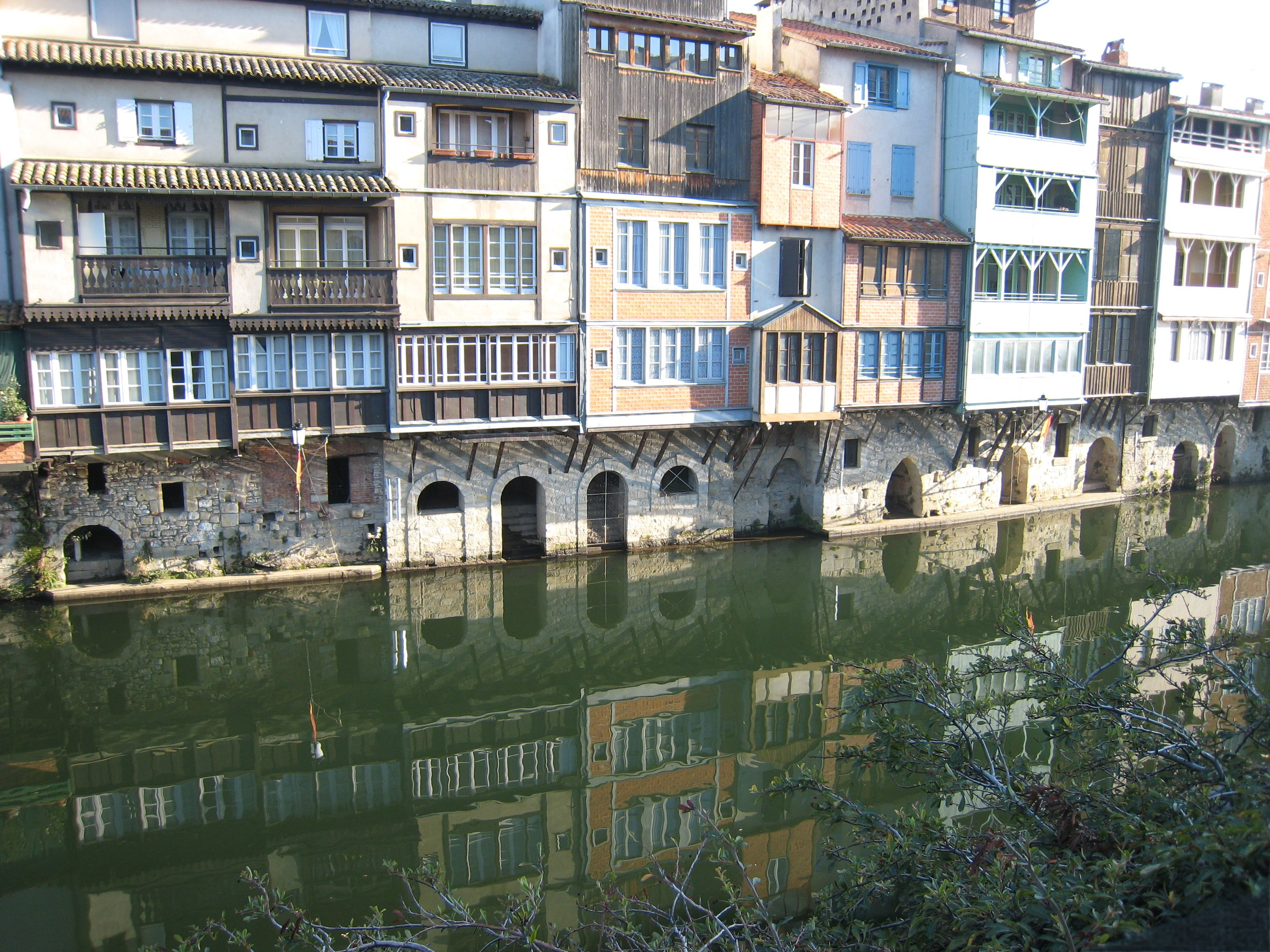 Castres (81), Maisons sur l'Agoût.JPG